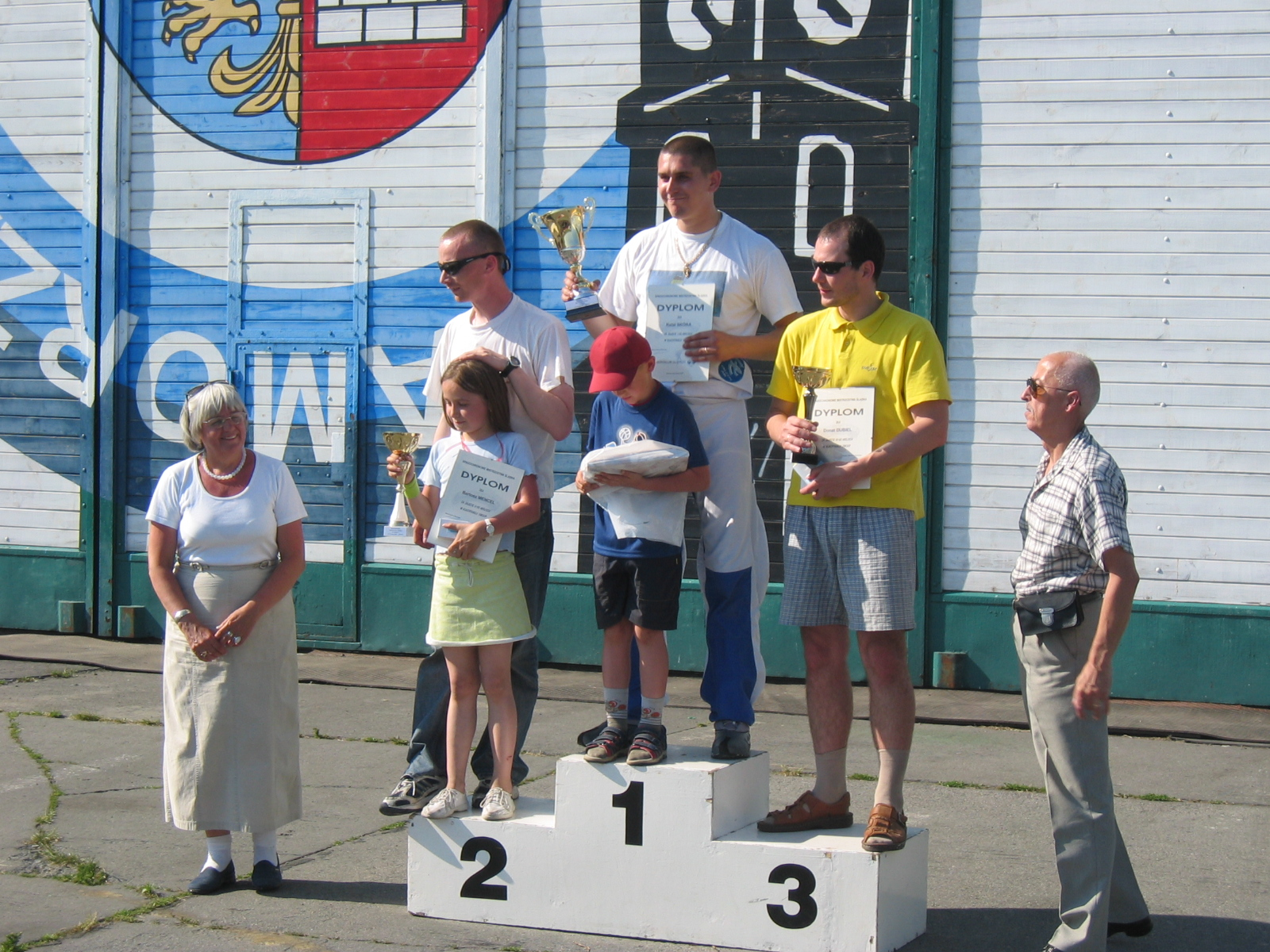 Spadochronowe Mistrzostwa Śląska 2005. Dekoracja uczestników, konkurencja SWOOP: I m-ce – Rafał Skóra 49,50 m, II miejsce – Bartosz Mencel 44,00 m, III miejsce – Donat Dubiel 36,50 m. Po prawej Marian Brytan — Sekcja Spadochronowa Aeroklubu Gliwickiego